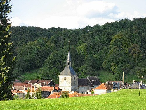 Vue de Cirey-sur-Blaise